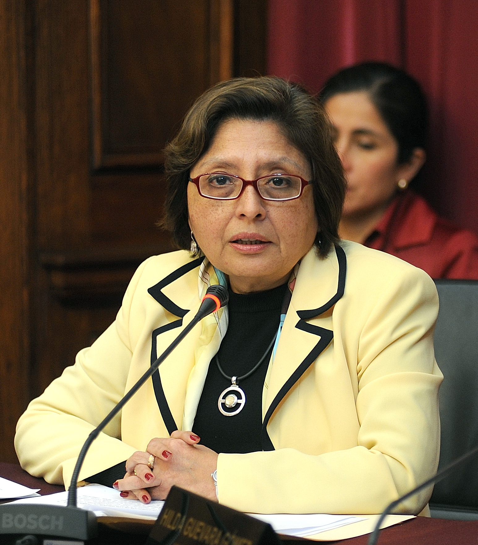 La congresista Fabiola Morales Castillo preside sesión, de carácter informativo, realizada hoy por la Comisión de la Mujer y Desarrollo Social.